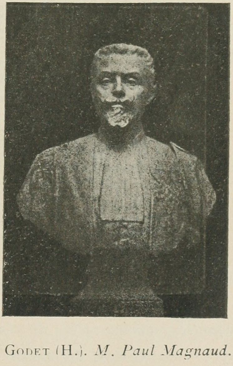 "M. [Jean Marie Bernard] Paul Magnaud."